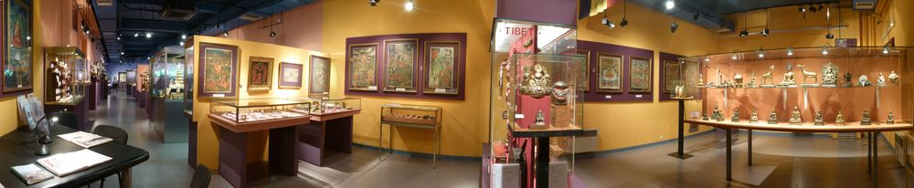 Tibet, Musée Asiatica